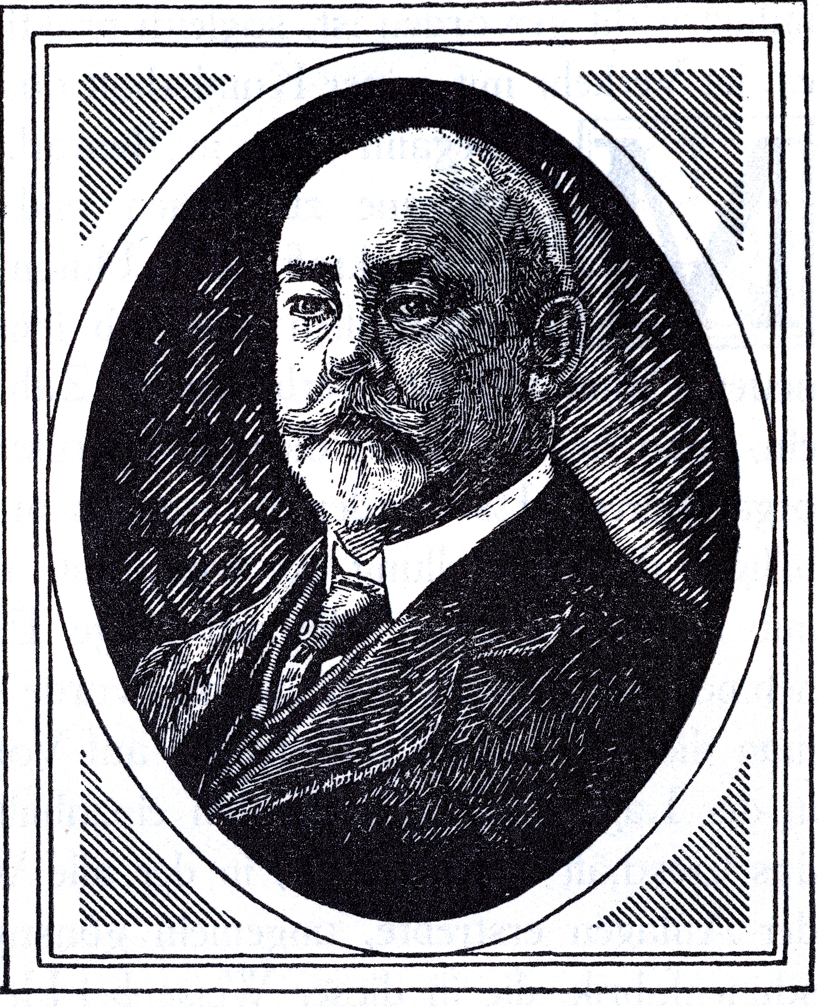 Wilhelm de Fries (1856-1919), Unternehmer in Düsseldorf